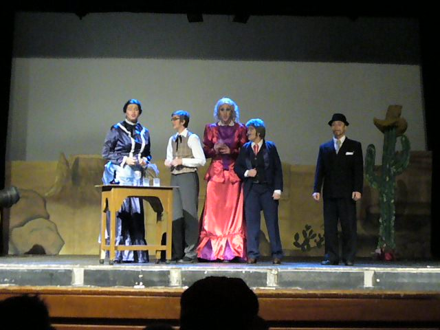 Linköpingsspexet "I valet och kvalet" performing in Täby, Sweden.